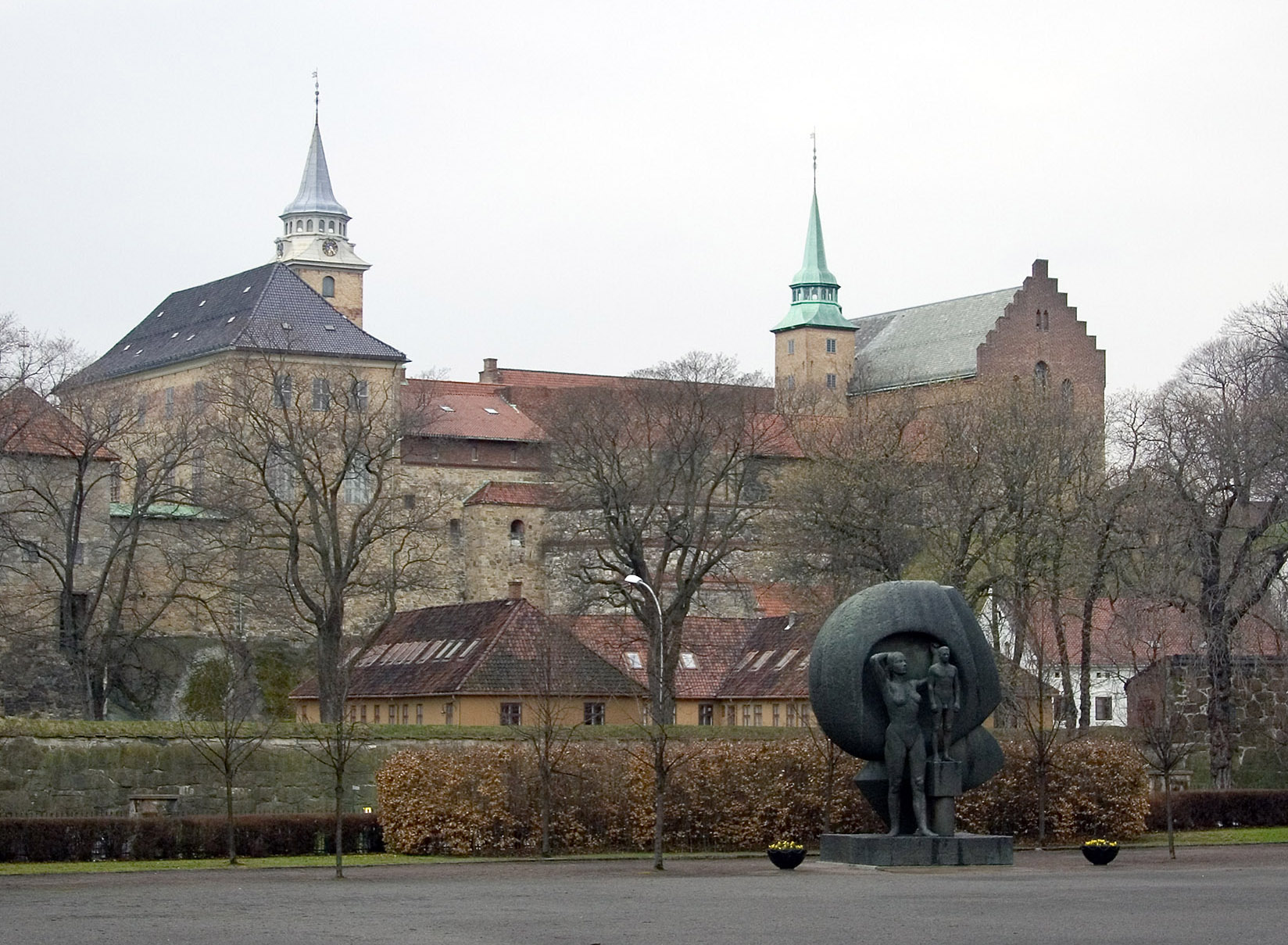 Akershus / Oslo, Norway